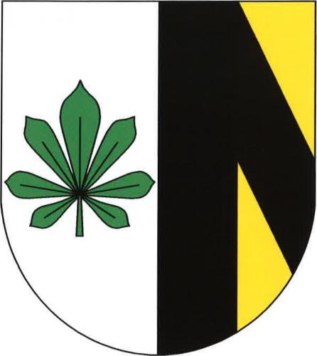 Liblice znak